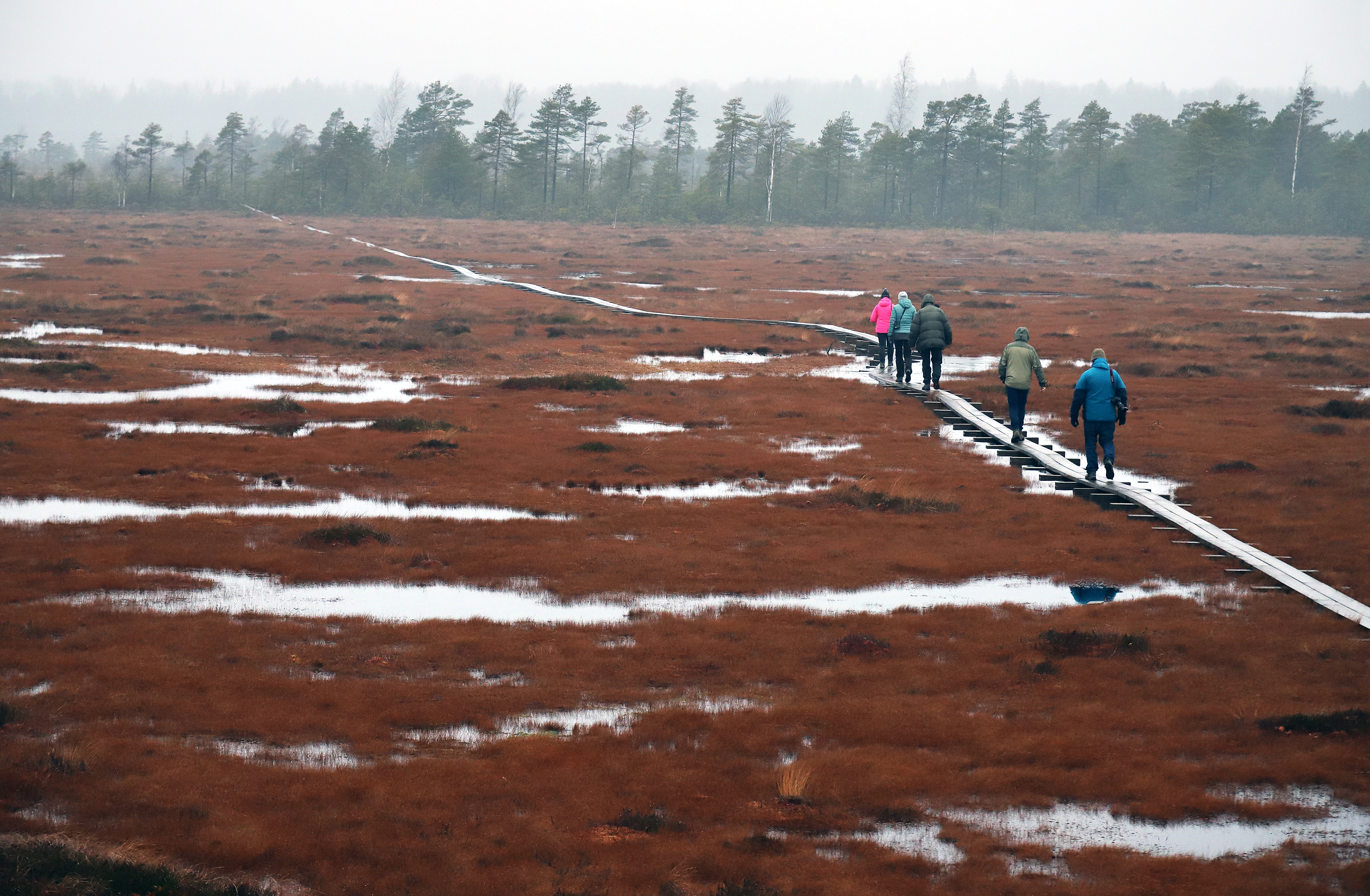 Nigula raba talvel 18. jaanuar 2020